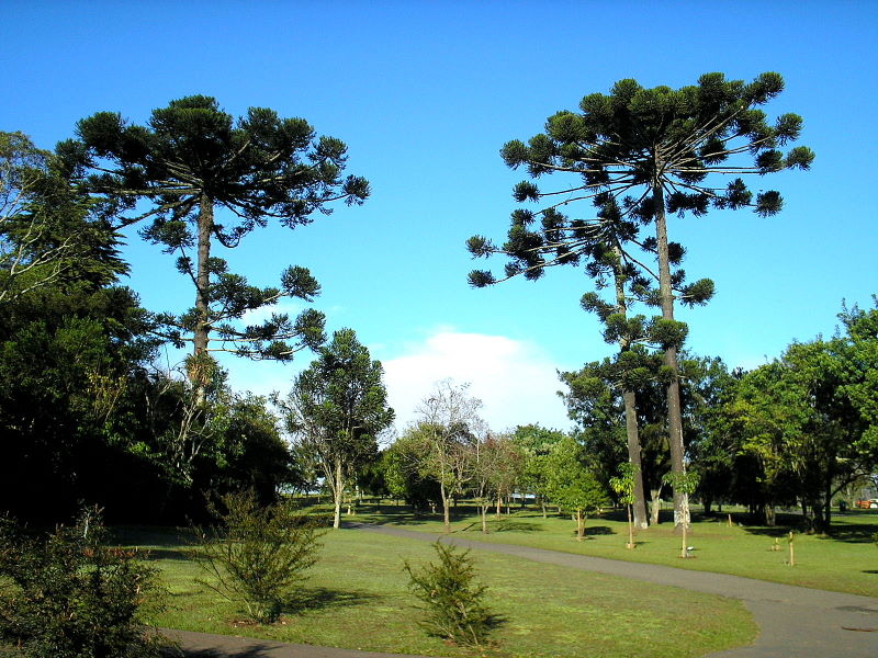 Araucárias (pinheiro-do-paraná) no Jardim Botânico de Curitiba, PR, Sul do Brasil.